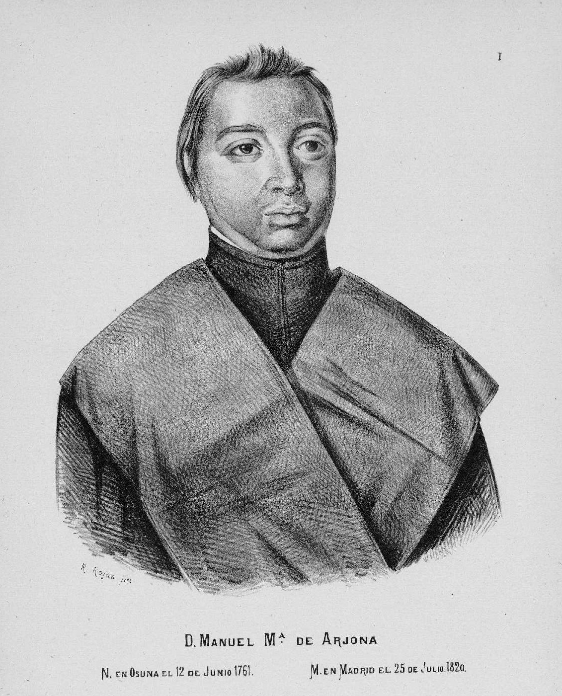 Manuel María de Arjona. Litografía de R. Rojas en José María Asensio: Retratos de autores españoles sacados en facsimile de antiguas ediciones de sus obras.